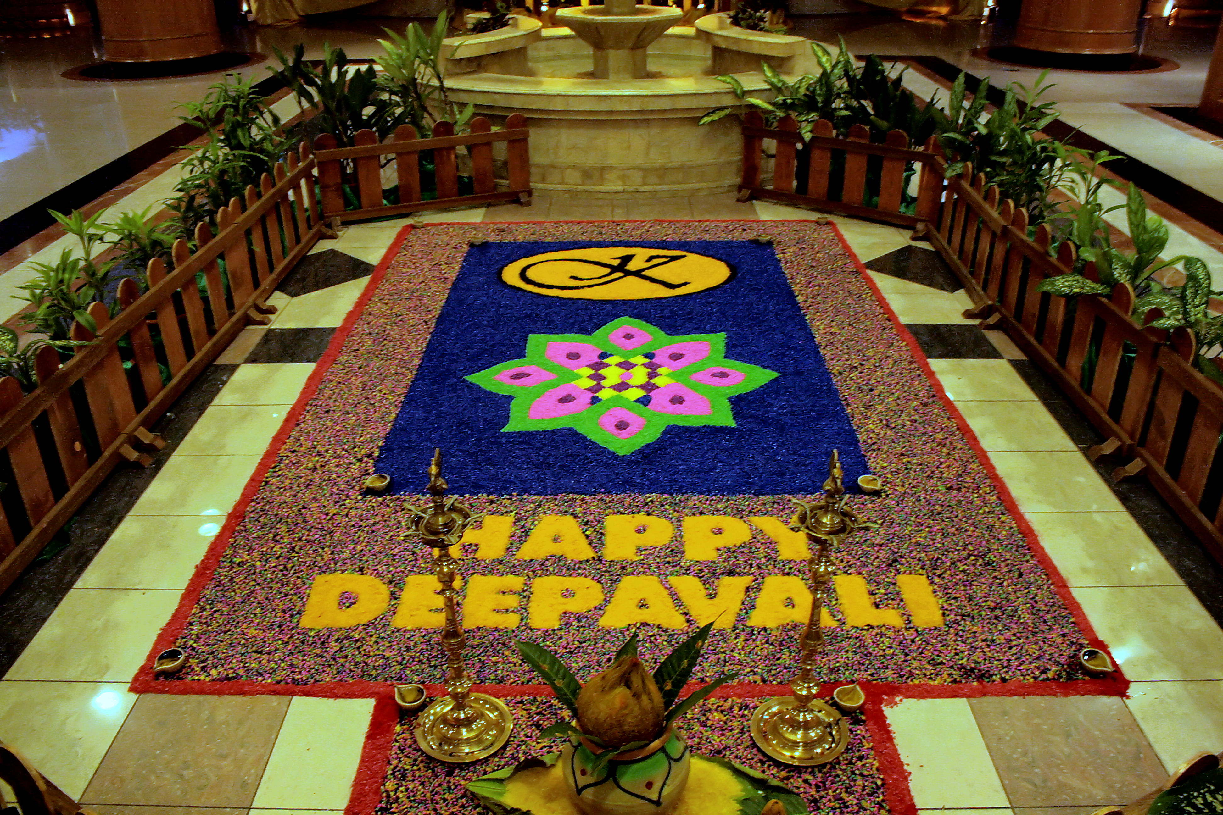 Kampong Baharu Bukit Temiang, Seremban, Negeri Sembilan, Malaysia Diwali 2009